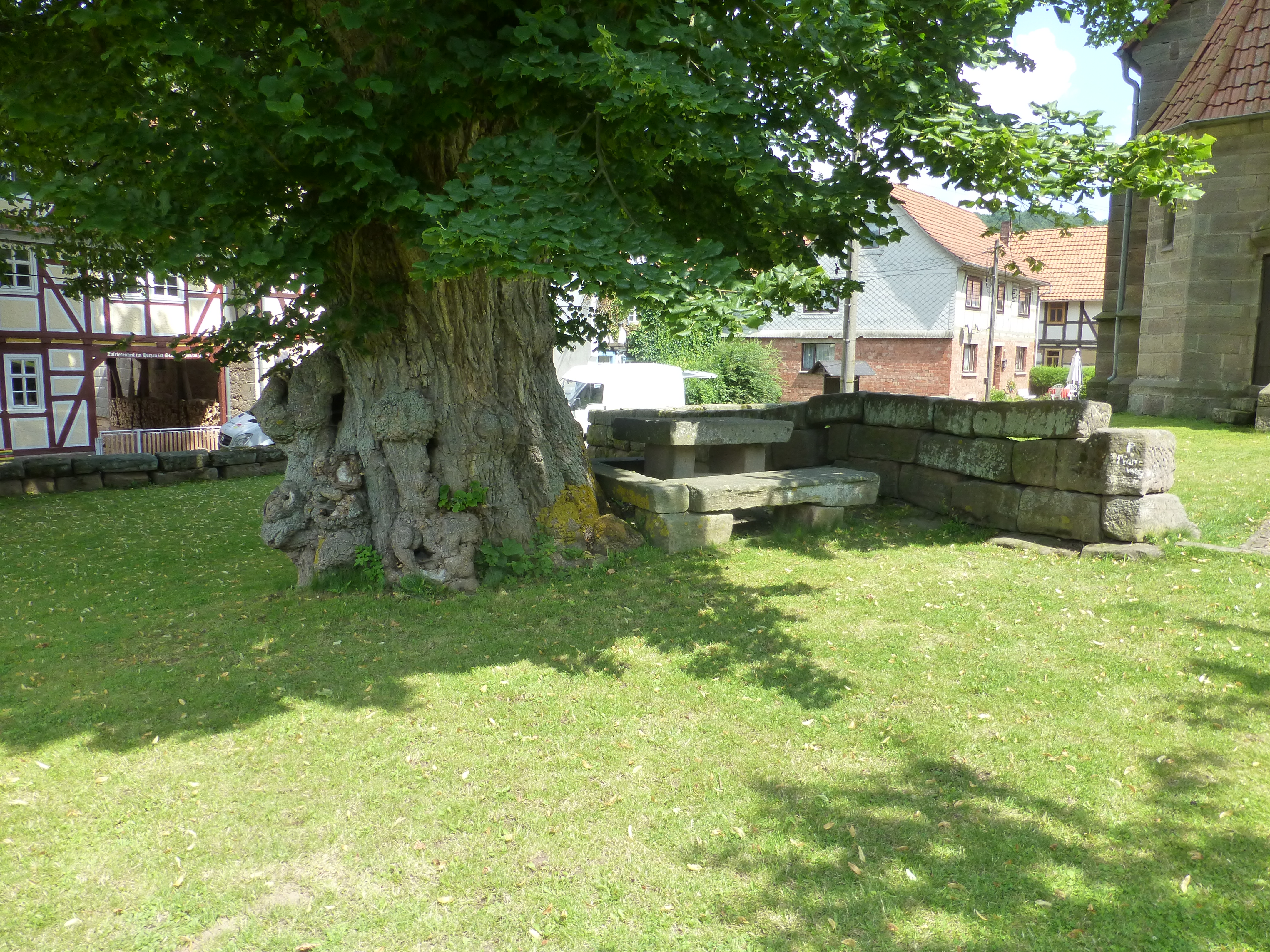 Der Anger in Vatterode